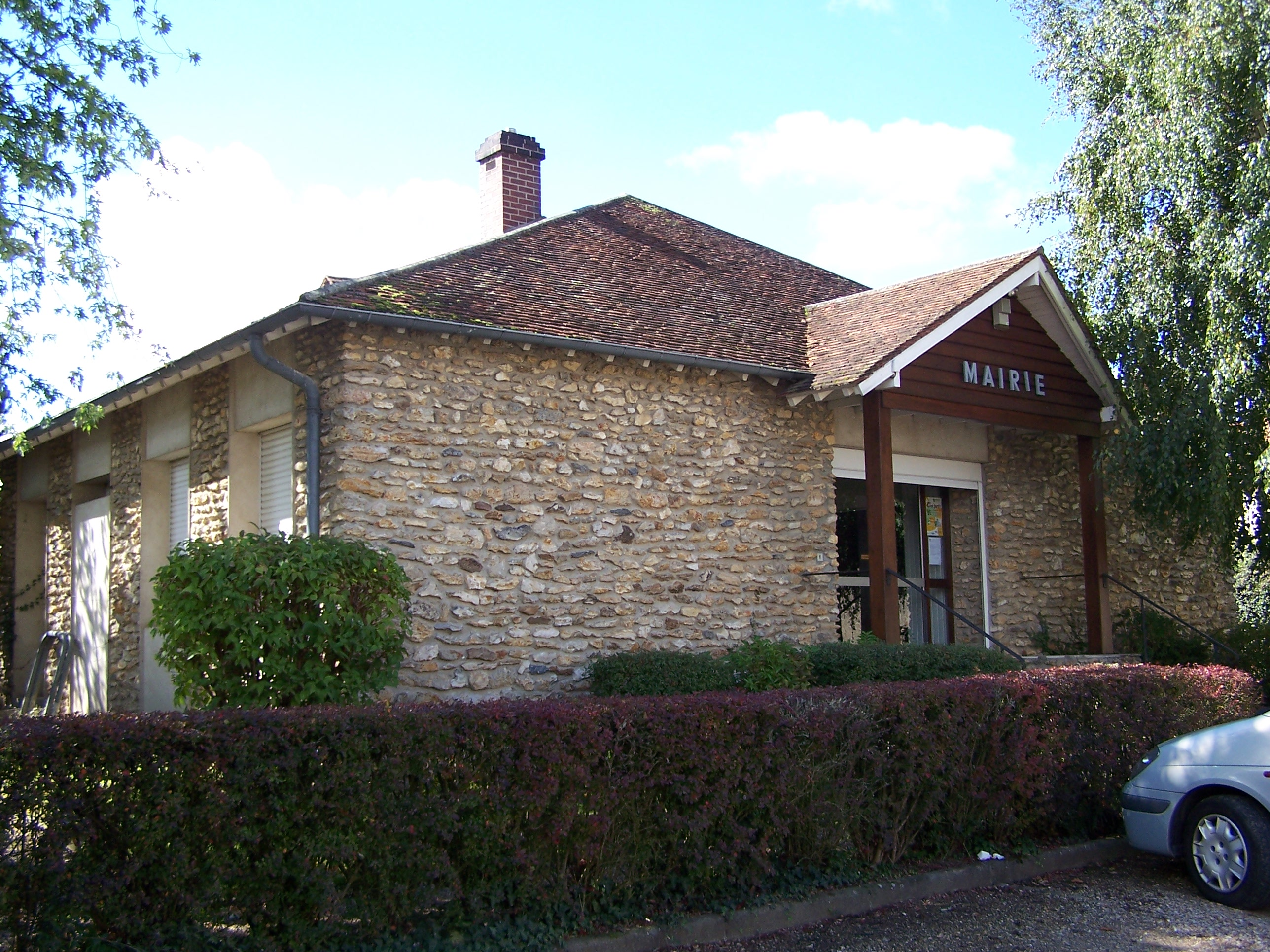 Mairie de Boissy-sans-Avoir (Yvelines, France)